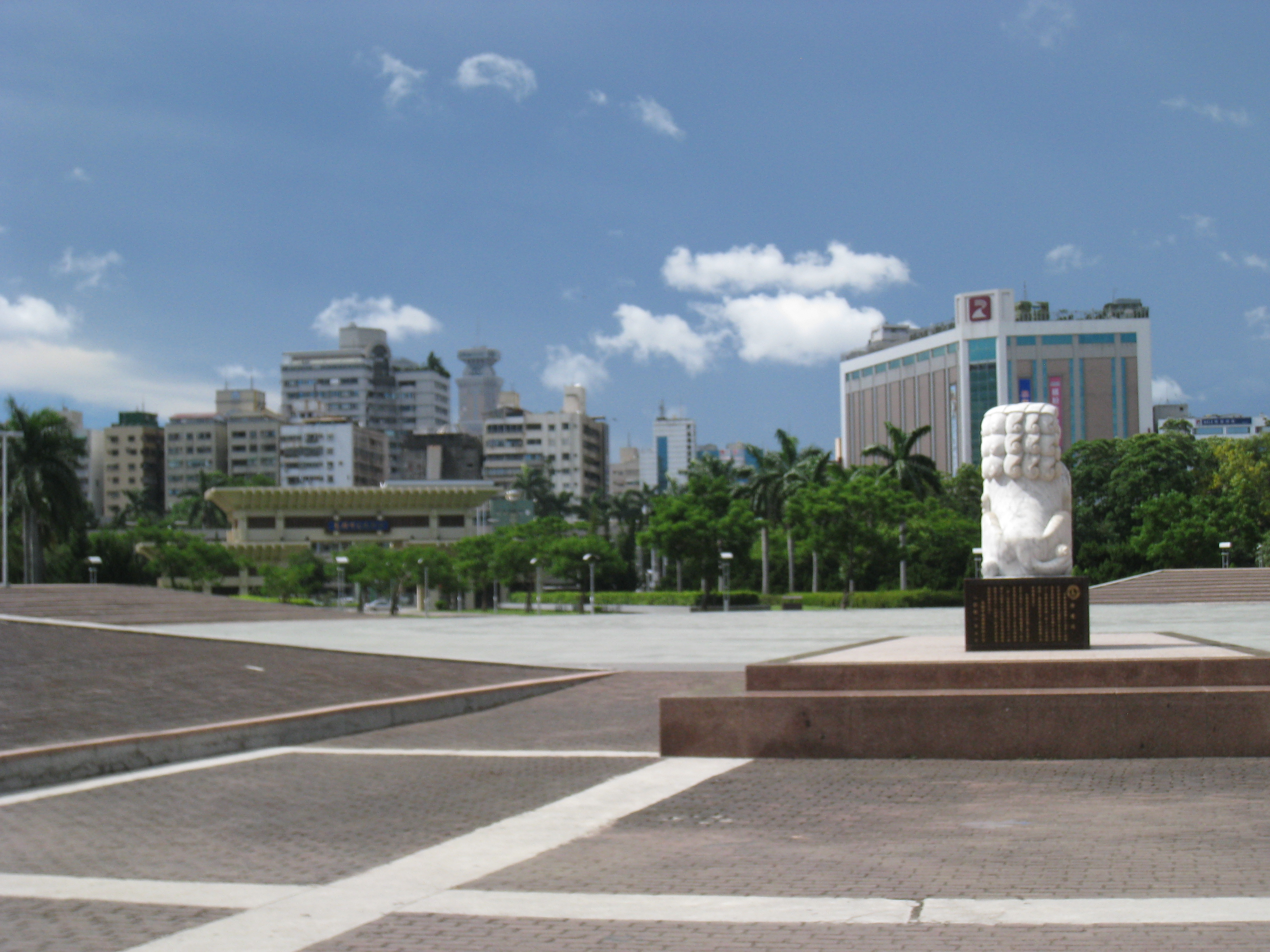 file@panoramio